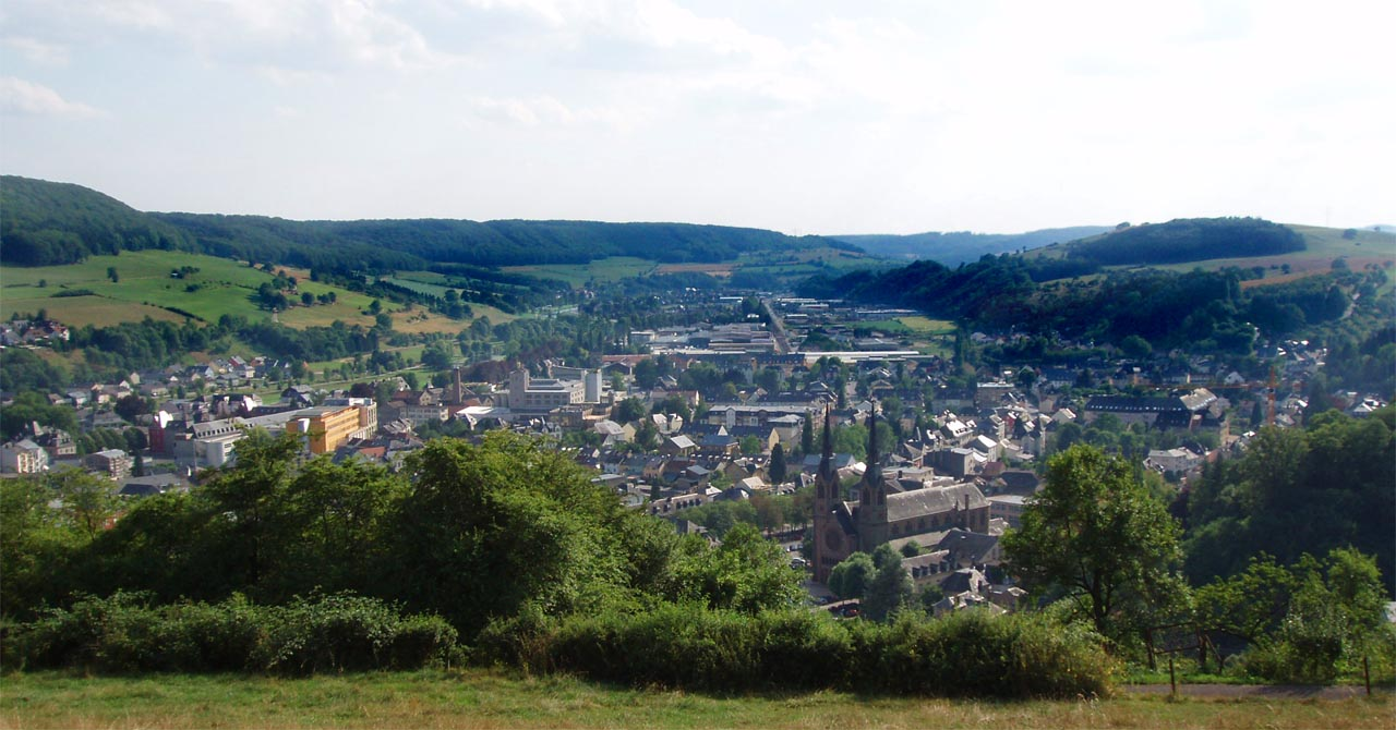 Vue op Dikrech vum Härebierg aus.